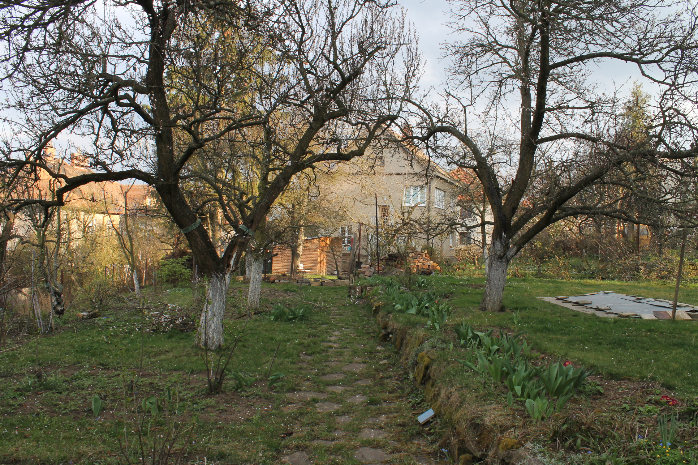 stará zahrada s ovocnými stromy, meruňky, Brno